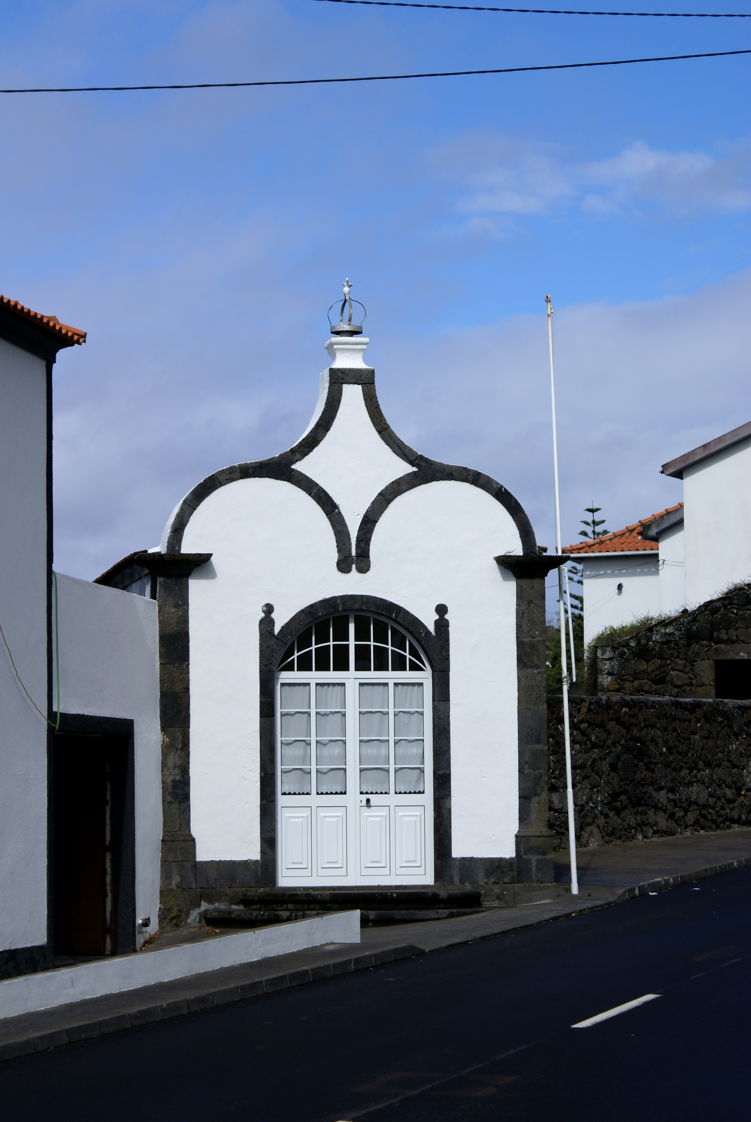 Império do Espírito Santo da Urzelina, Velas, ilha de São Jorge, Açores